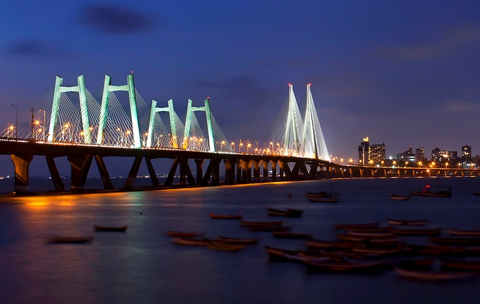 Bandra Worli Bridge in Mumbai, India